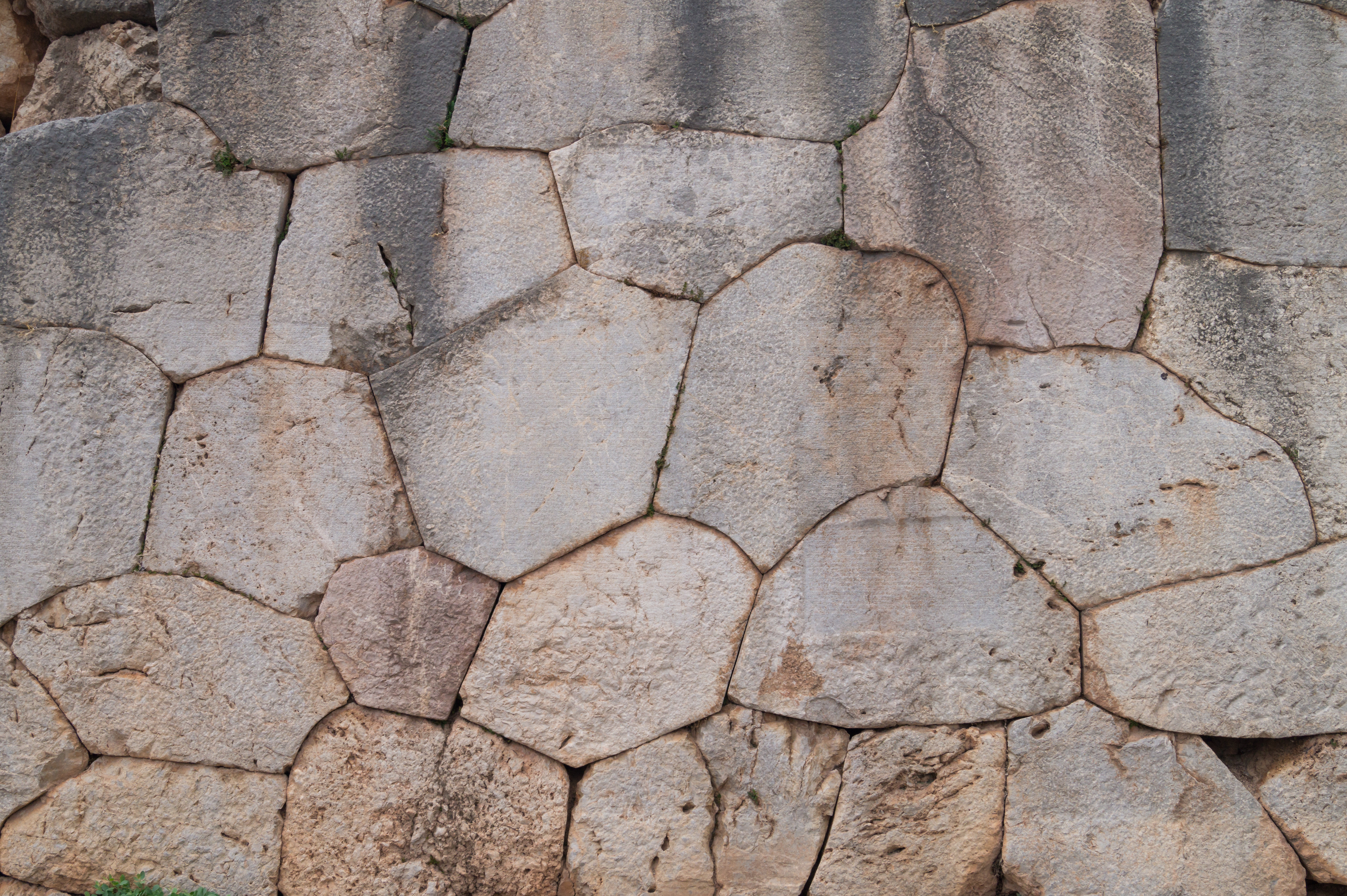 Polygonwand in der Ausgrabungsstätte zu Delphi.